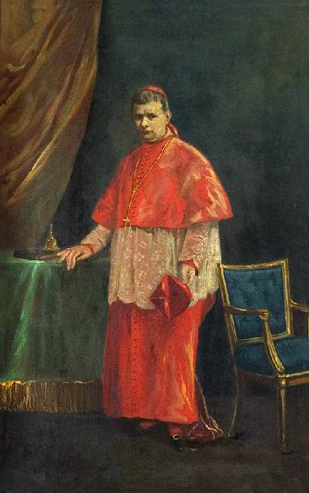 Sisto Riario Sforza/ Ambito napoletano sec. XIX, Ritratto del cardinale Sforza